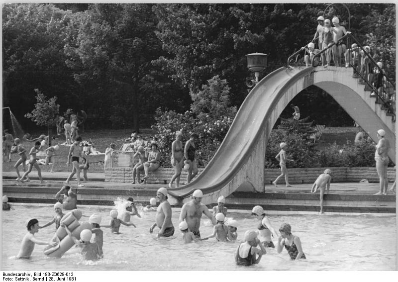 ADN-ZB Settnik 28.6.1981 Berlin-Strahlender Sonnenschein lockte viele Badeengel ins kühle Naß des Pankower Freibades.